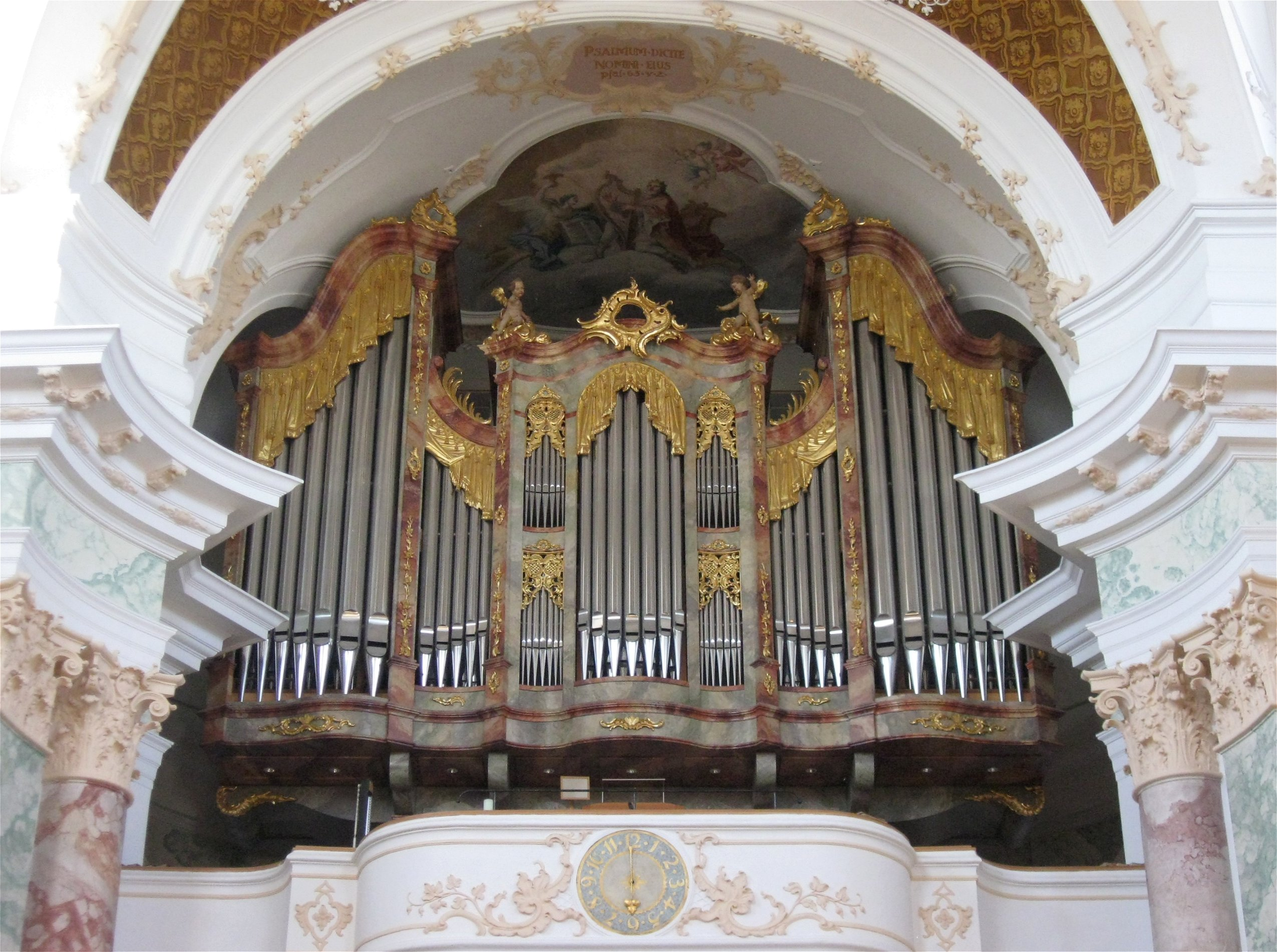 Orgel, St. Michael (Berg am Laim), München